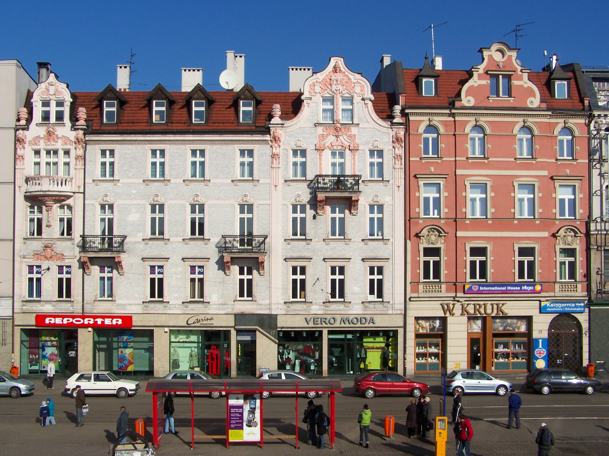 Budovy na ulici 3 maja (čísla popisné 15 a 17) v Katowicích, v Polsku. Na čísle 17 se nachází secesní dům z roku 1904 (architekt F. Cwienk). Naproti tomuto bloku domů se nachází hlavní katowické nádraží.